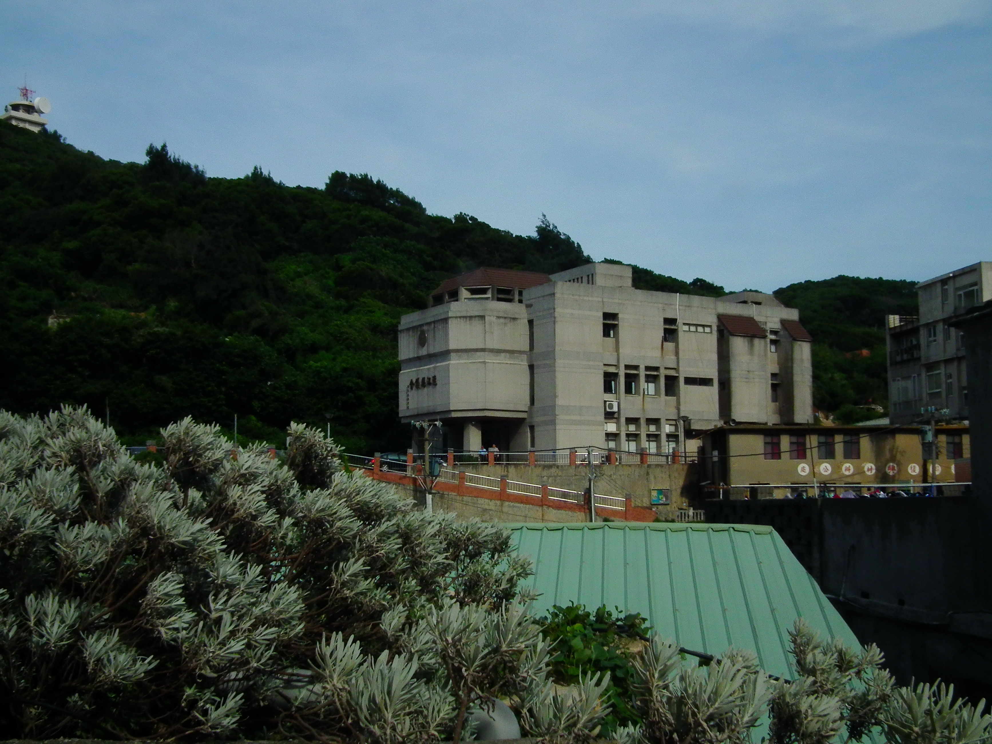 中華民國福建省連江縣議會。